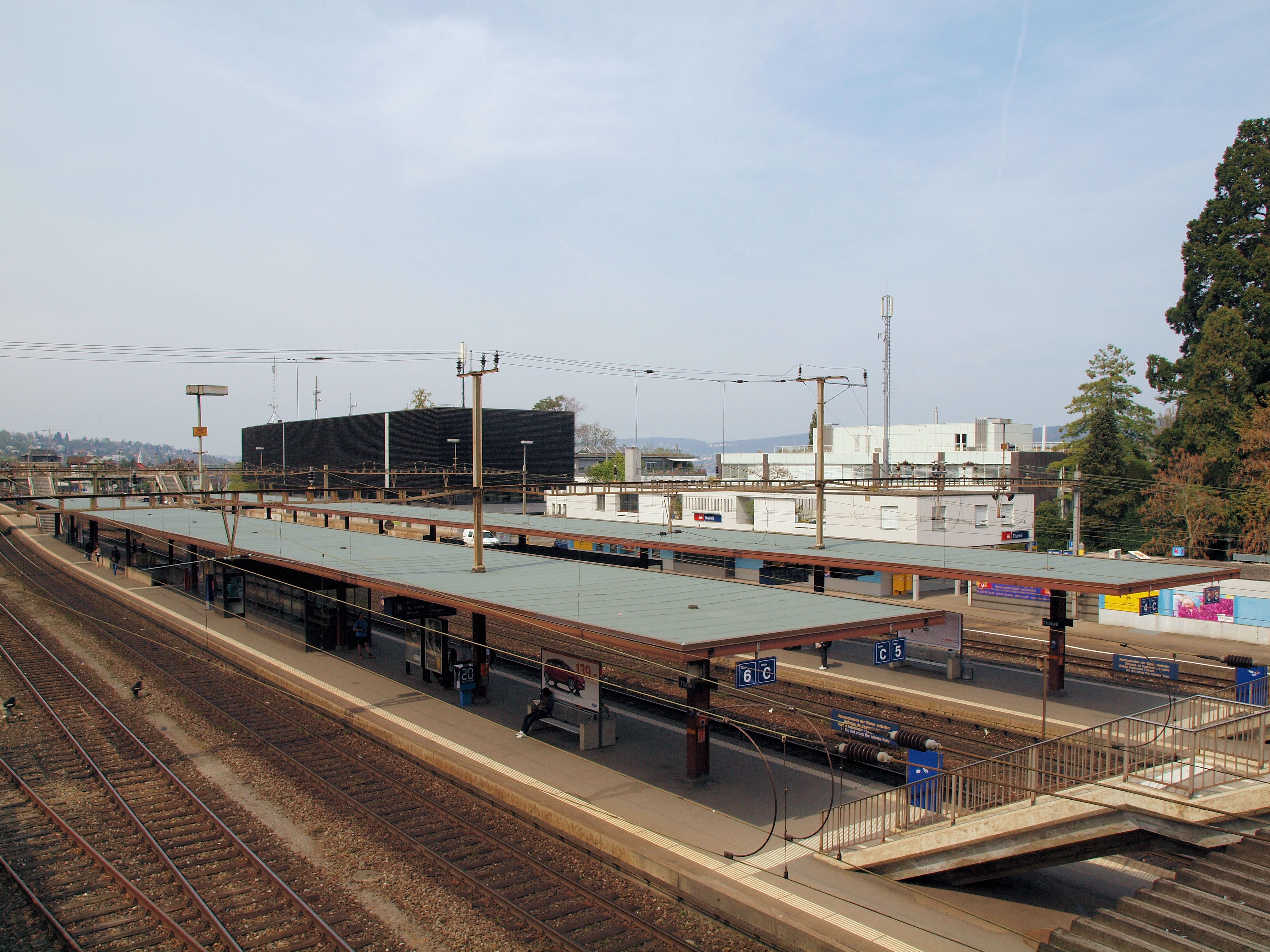 Der Bahnhof Thalwil